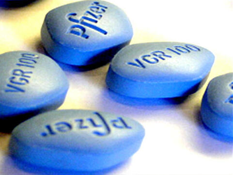 Counterfeit drugs